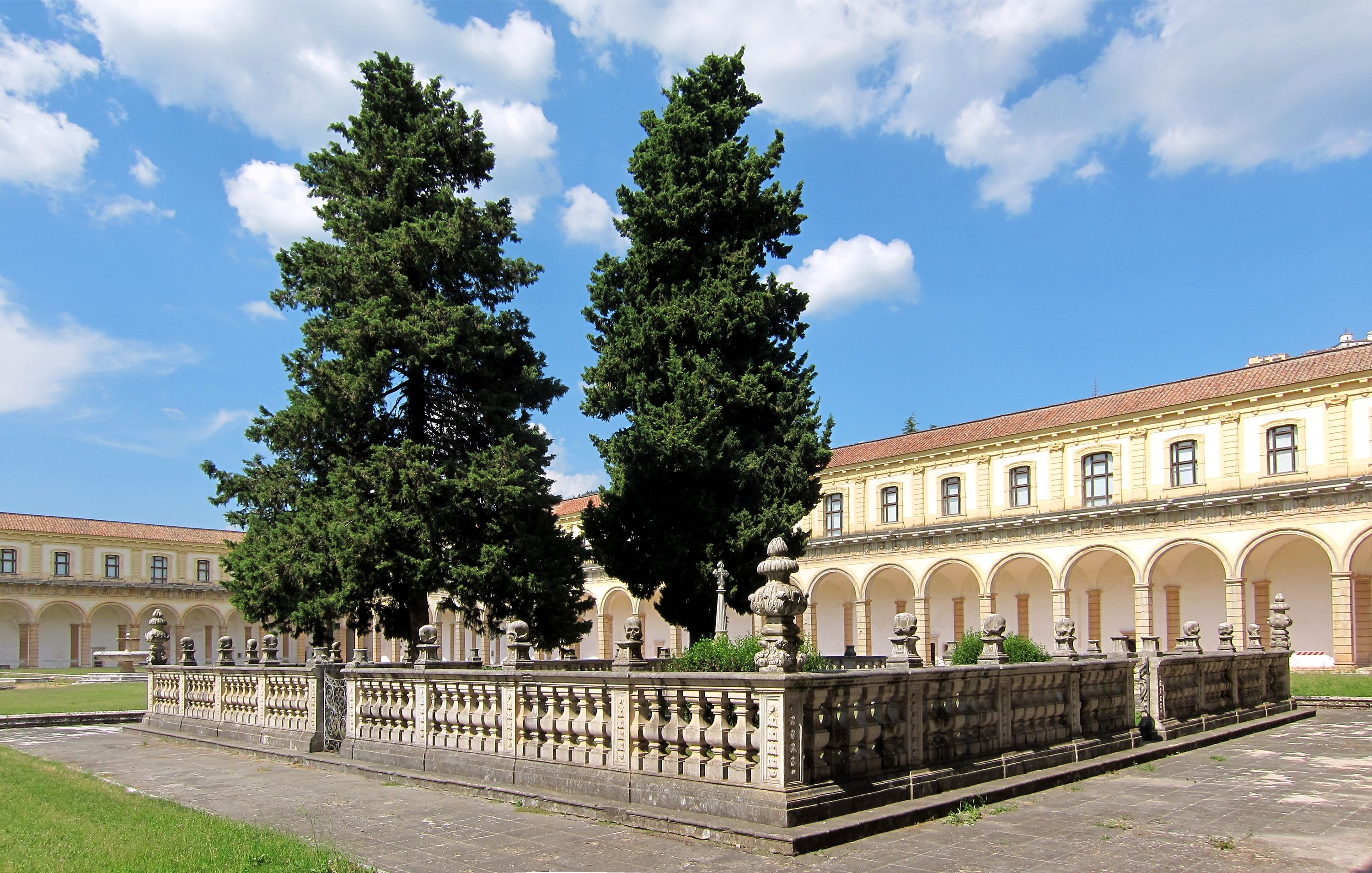 Vue du cloitre de la Certosa di San Lorenzo (Padula).